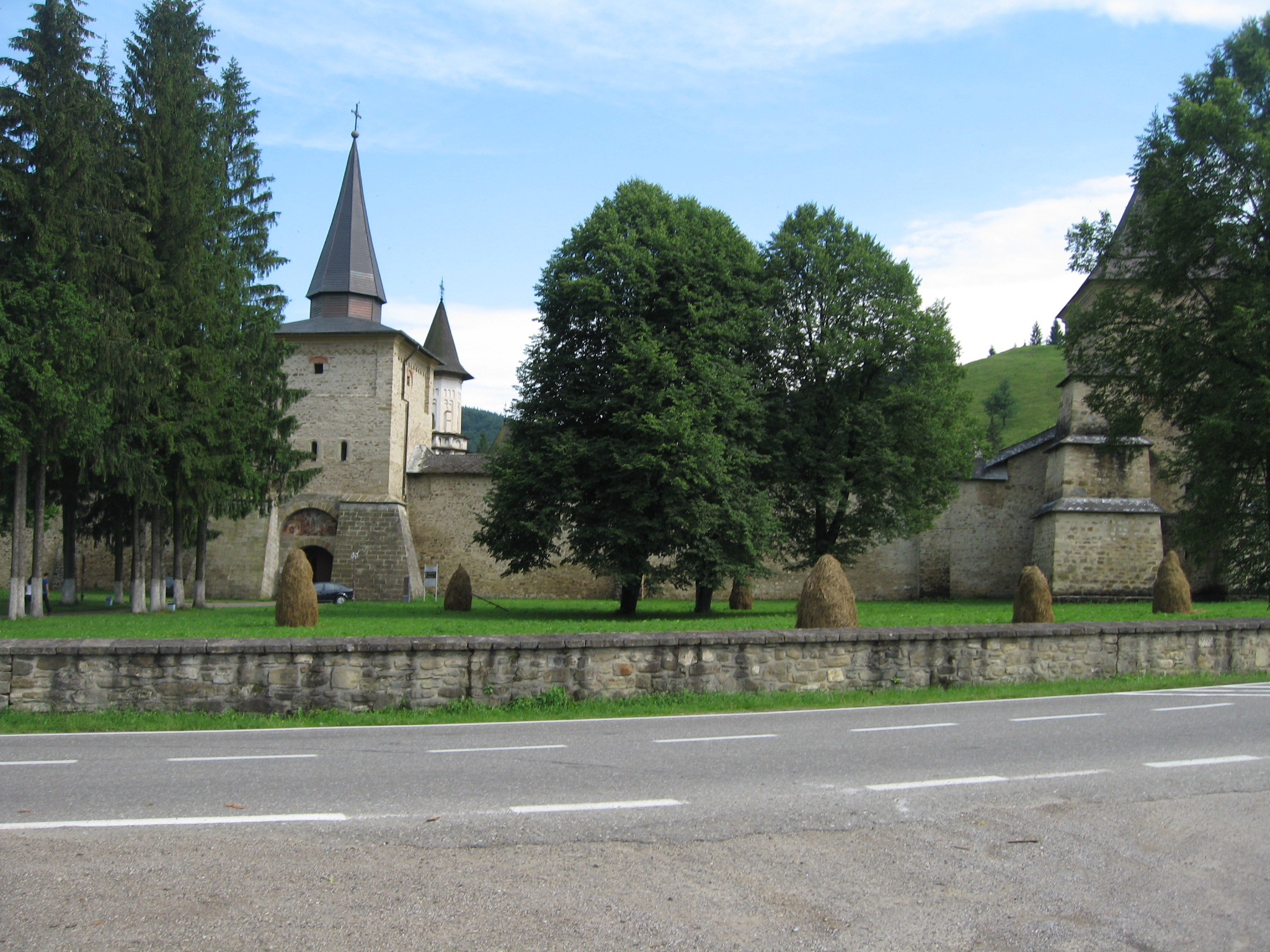 Mănăstirea Suceviţa 04